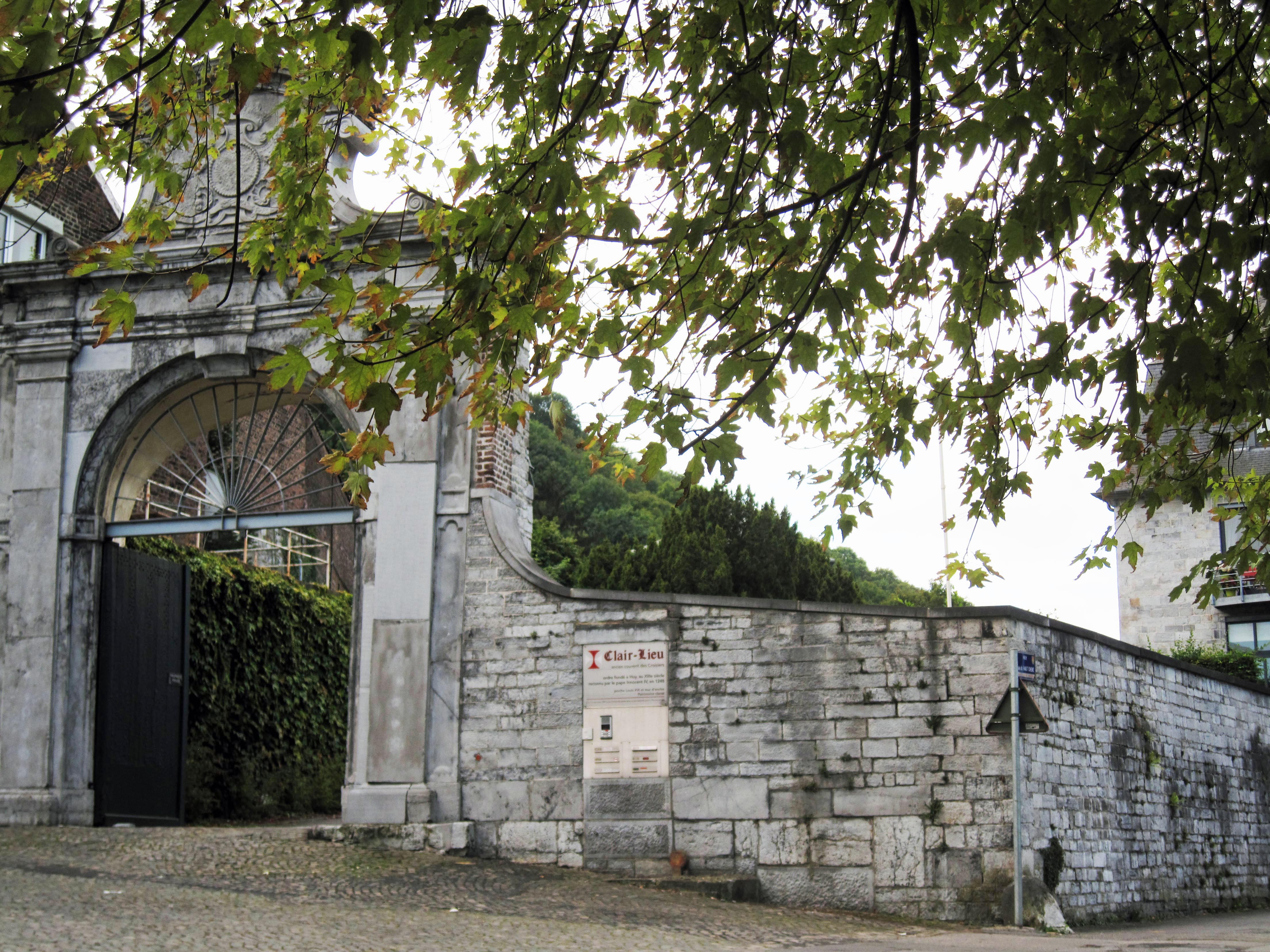 Certaines parties de l'ancien couvent des Croisiers, sis rue des Larrons n° 23, à savoir: le porche d'entrée Louis XIV; le mur d'enclos commun à l'ancienne brasserie et au porche; l'ancienne brasserie (façade et toitures) (M).